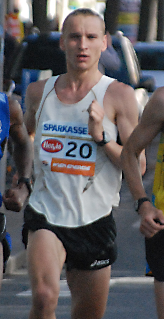 Sergio Silva, Valerijs Zolnerovics und Fedor Shutov beim Vienna City Marathon 2013 auf der Mariahilfer Straße im 15. Wiener Gemeindebezirk